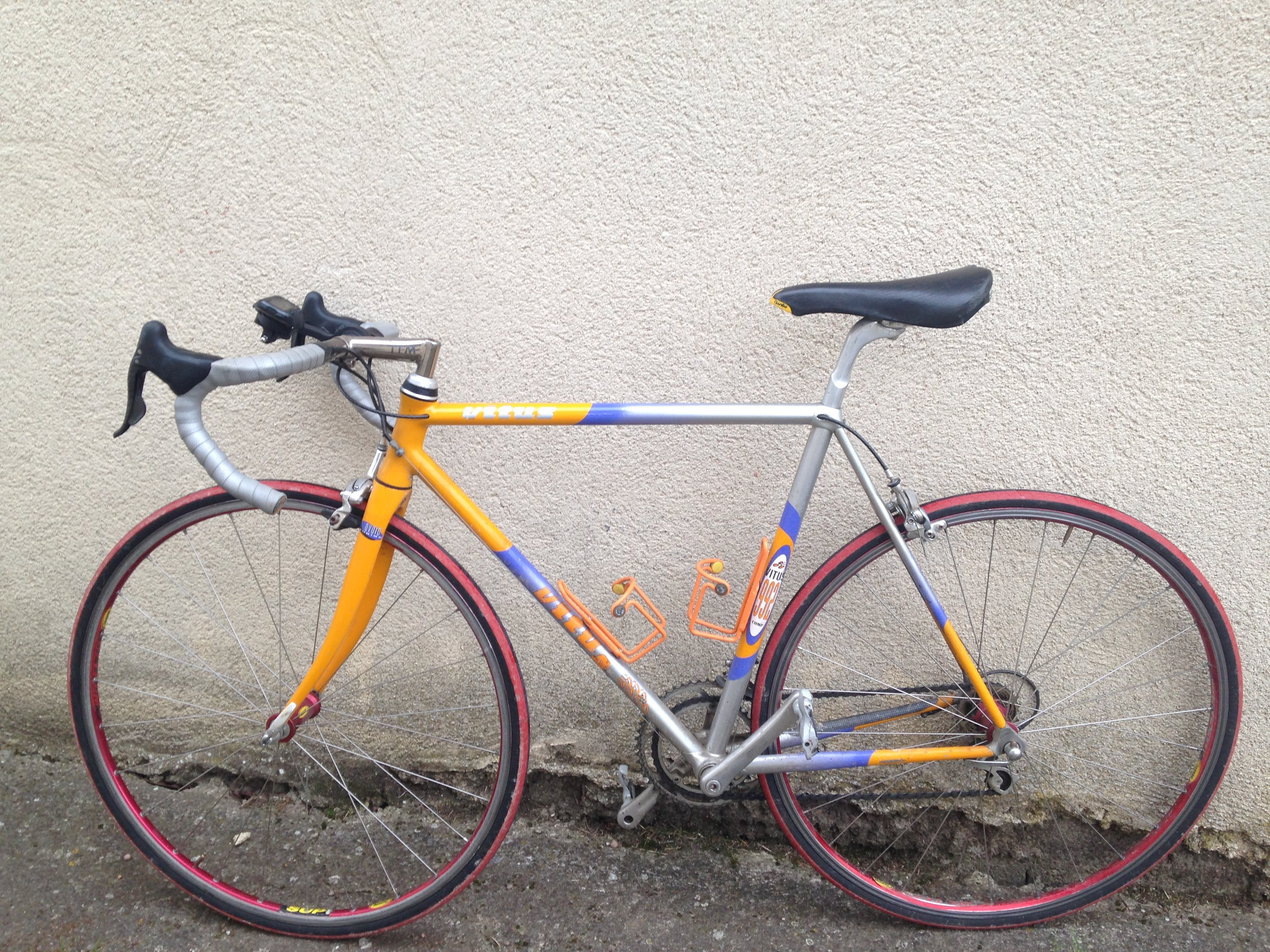 Exemple de configuration du modèle 992 Ovoid.